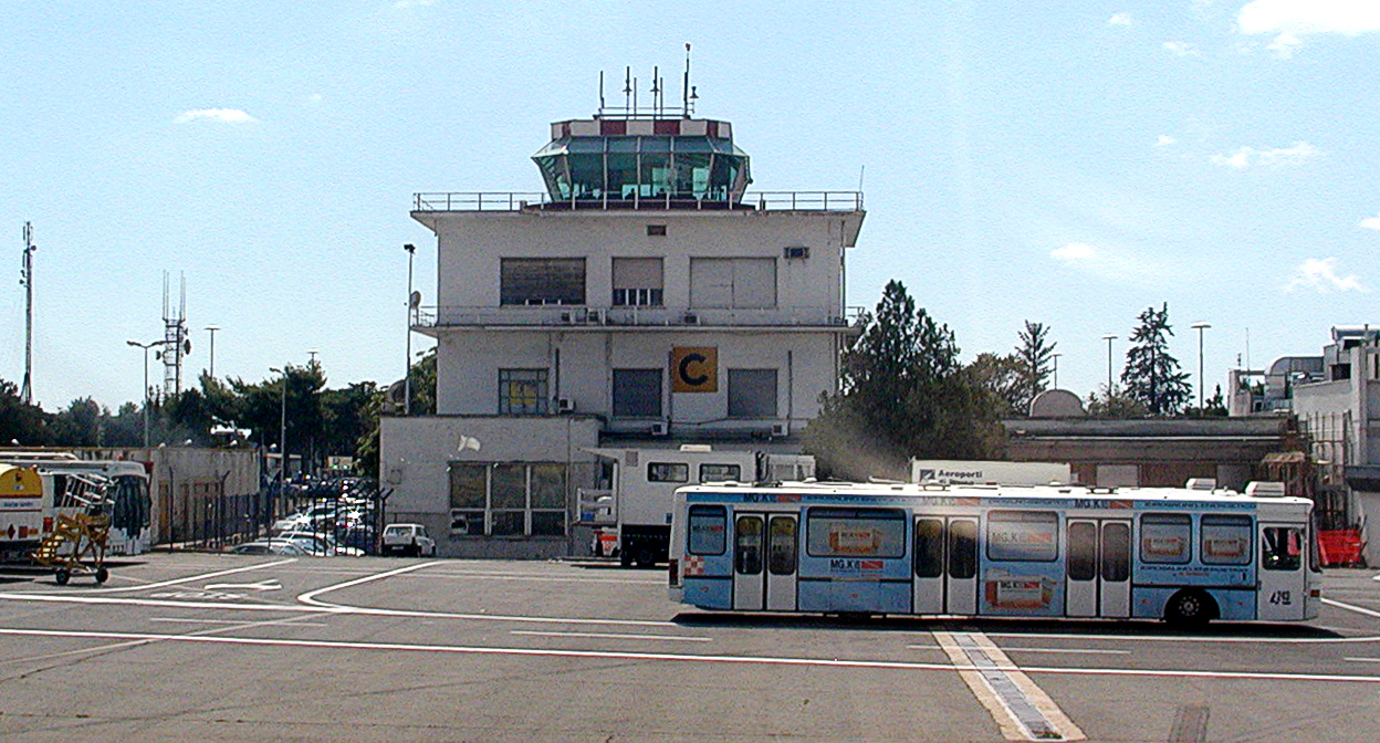 Bild vom Flughafen Rom-Ciampino.